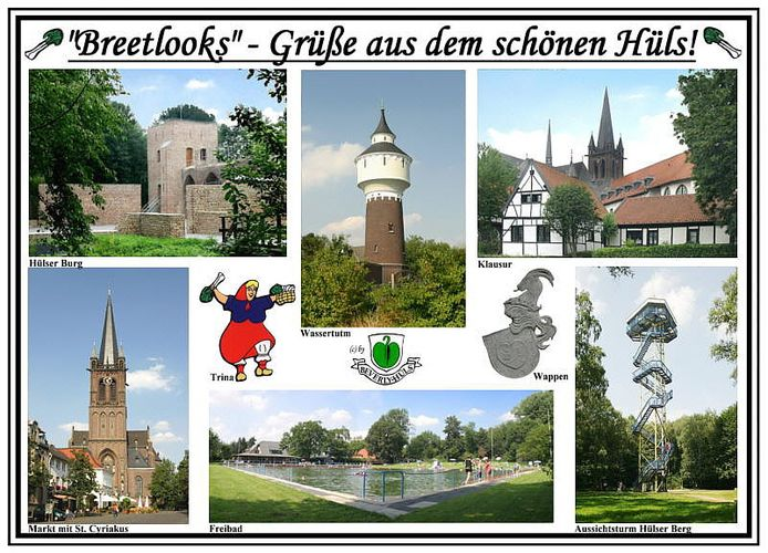 Hülser Impressionen